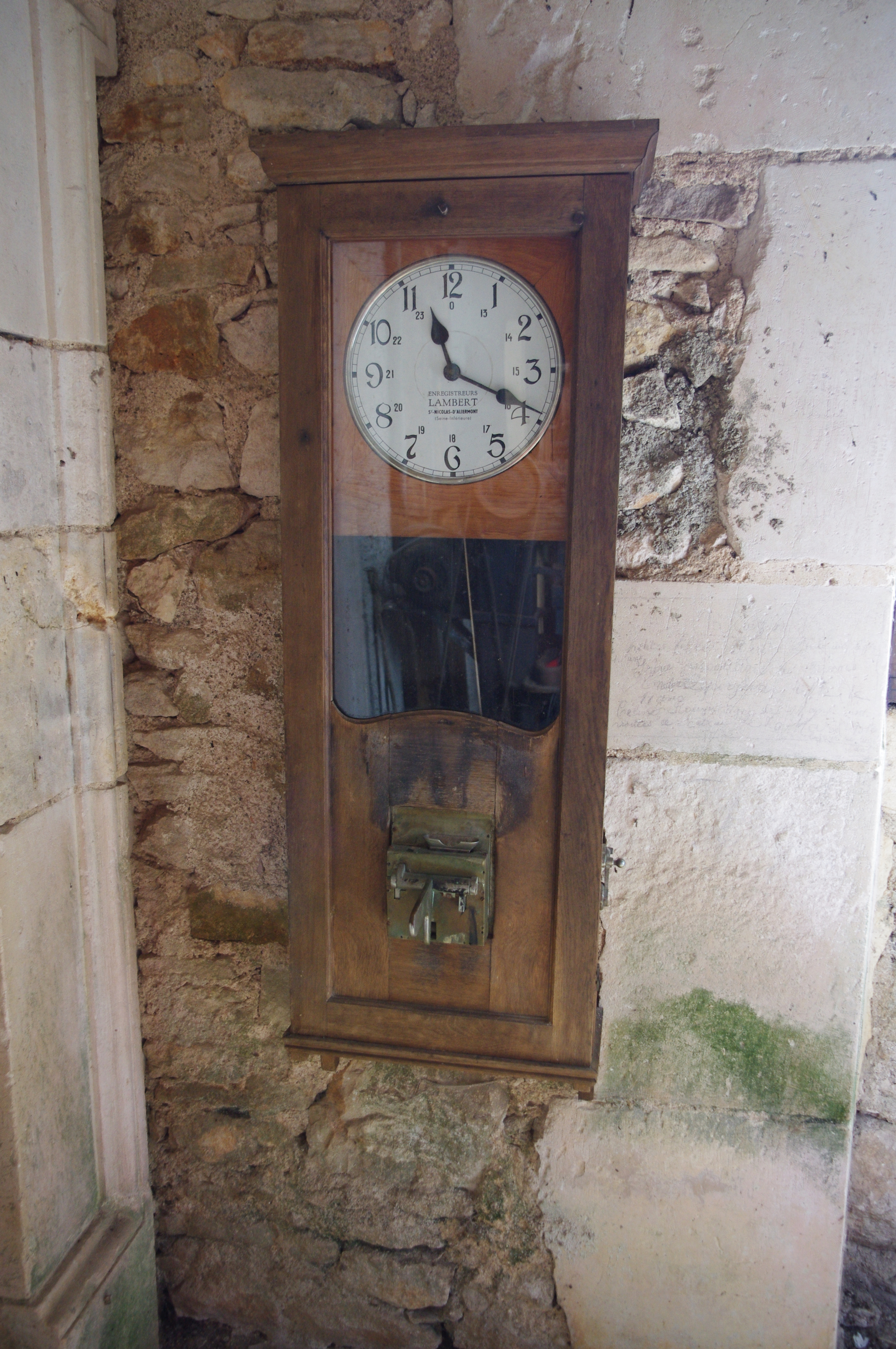 Château-musée de Varaignes (Dordogne), pointeuse. Inscription: Enregistreurs Lambert, St Nicolas d'Aliermont (Seine Inférieure)